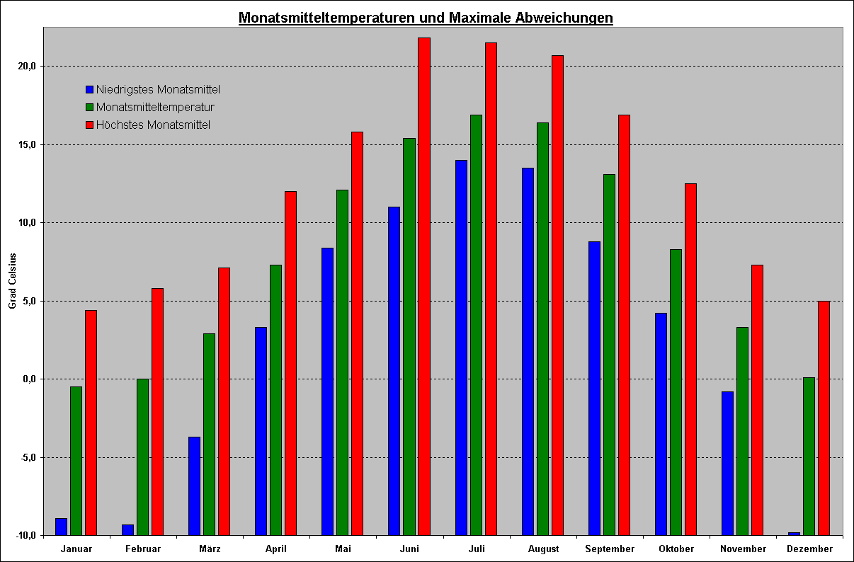 Temperaturzeitreihe Deutschland, Abweichung